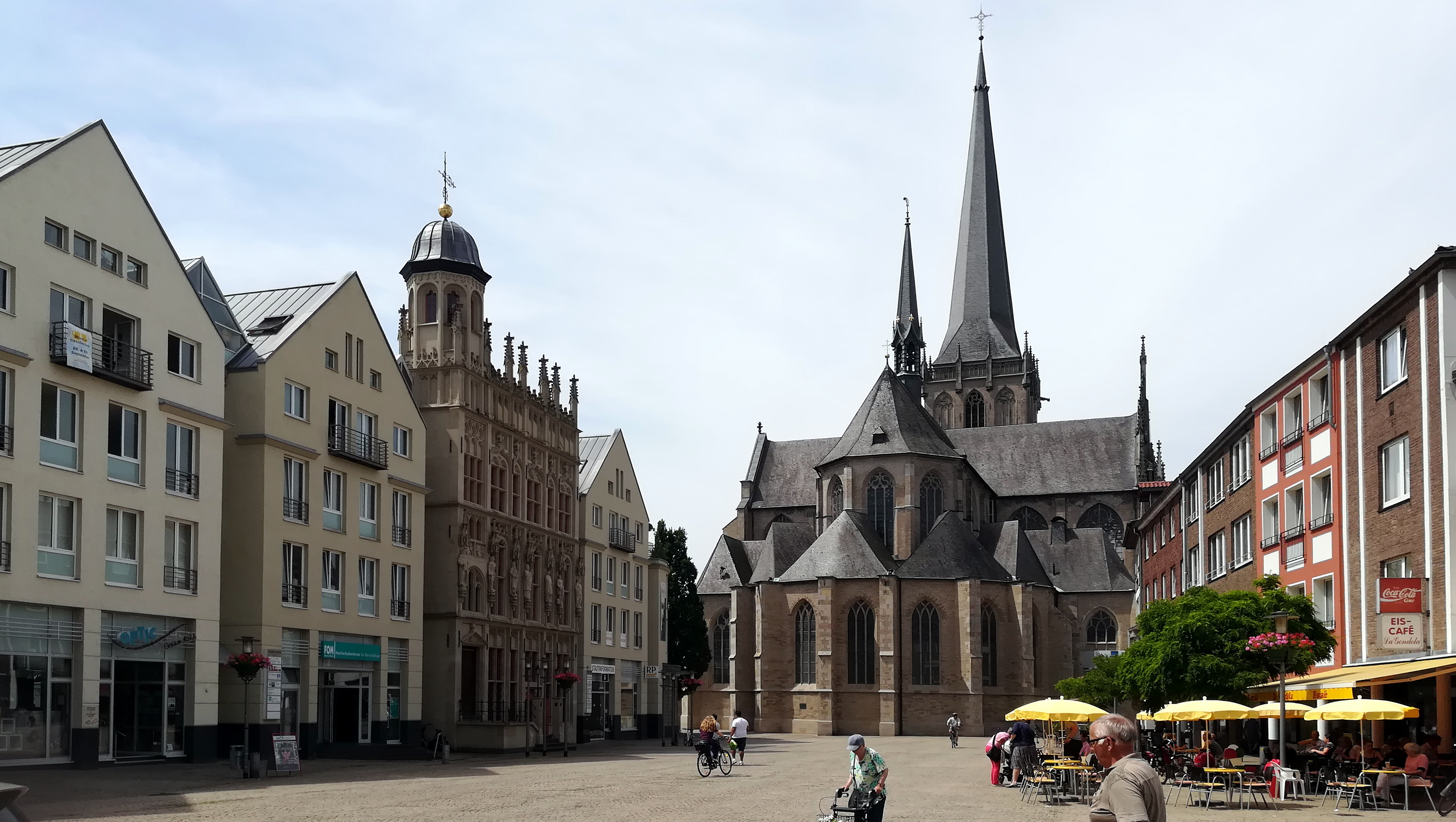 Der Willibrordi-Dom in Wesel wurde von 1498 bis 1540 als spätgotische Basilika mit fünf Kirchenschiffen erbaut.